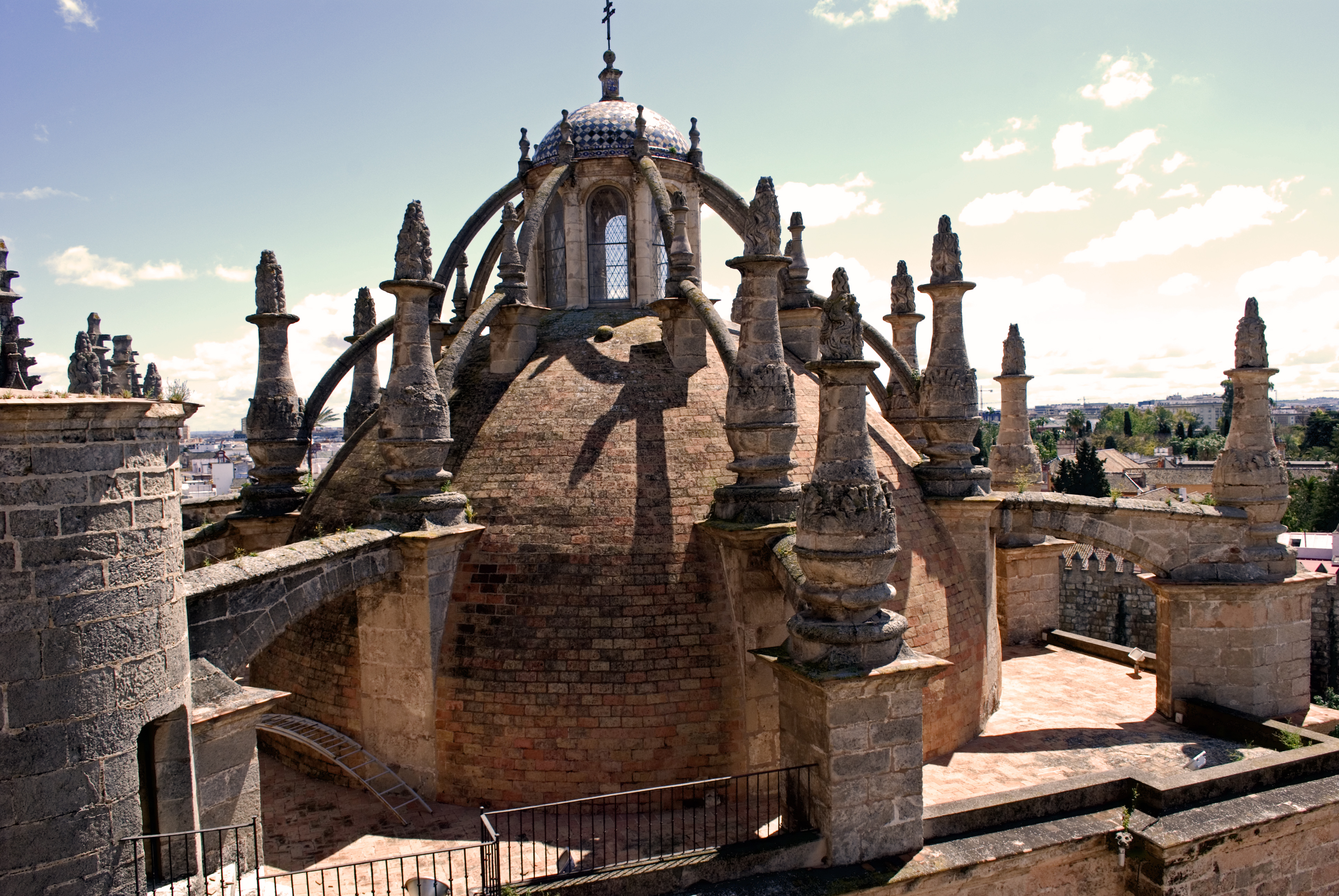 Vista exterior de la cúpula de la sacristía mayor de la catedral de Sevilla